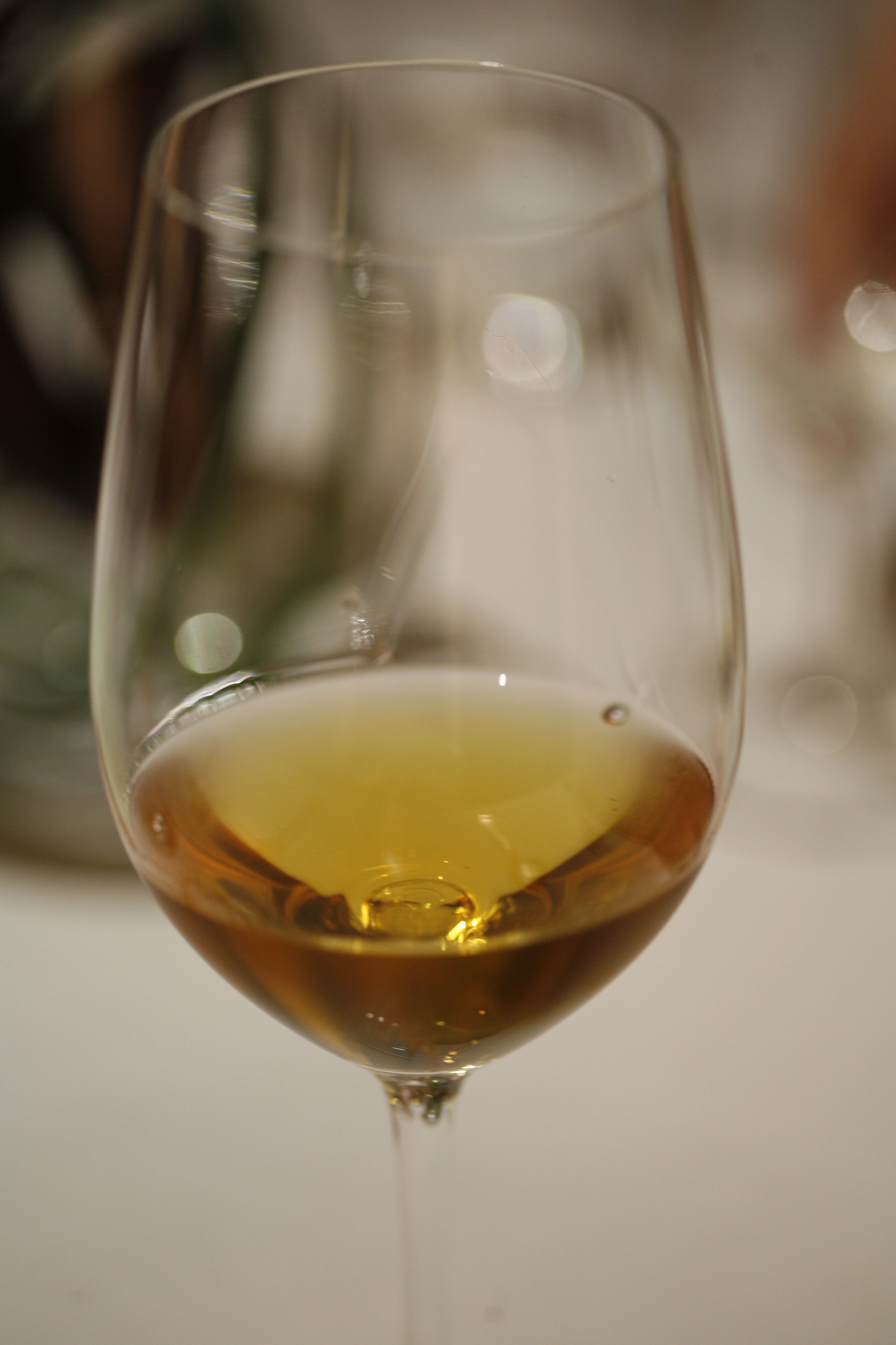 2000 Tokaji Aszu, 6 Puttonyos, Oremus. Hungarian dessert wine